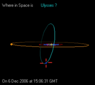 mnou upravený obrázek z free programu na